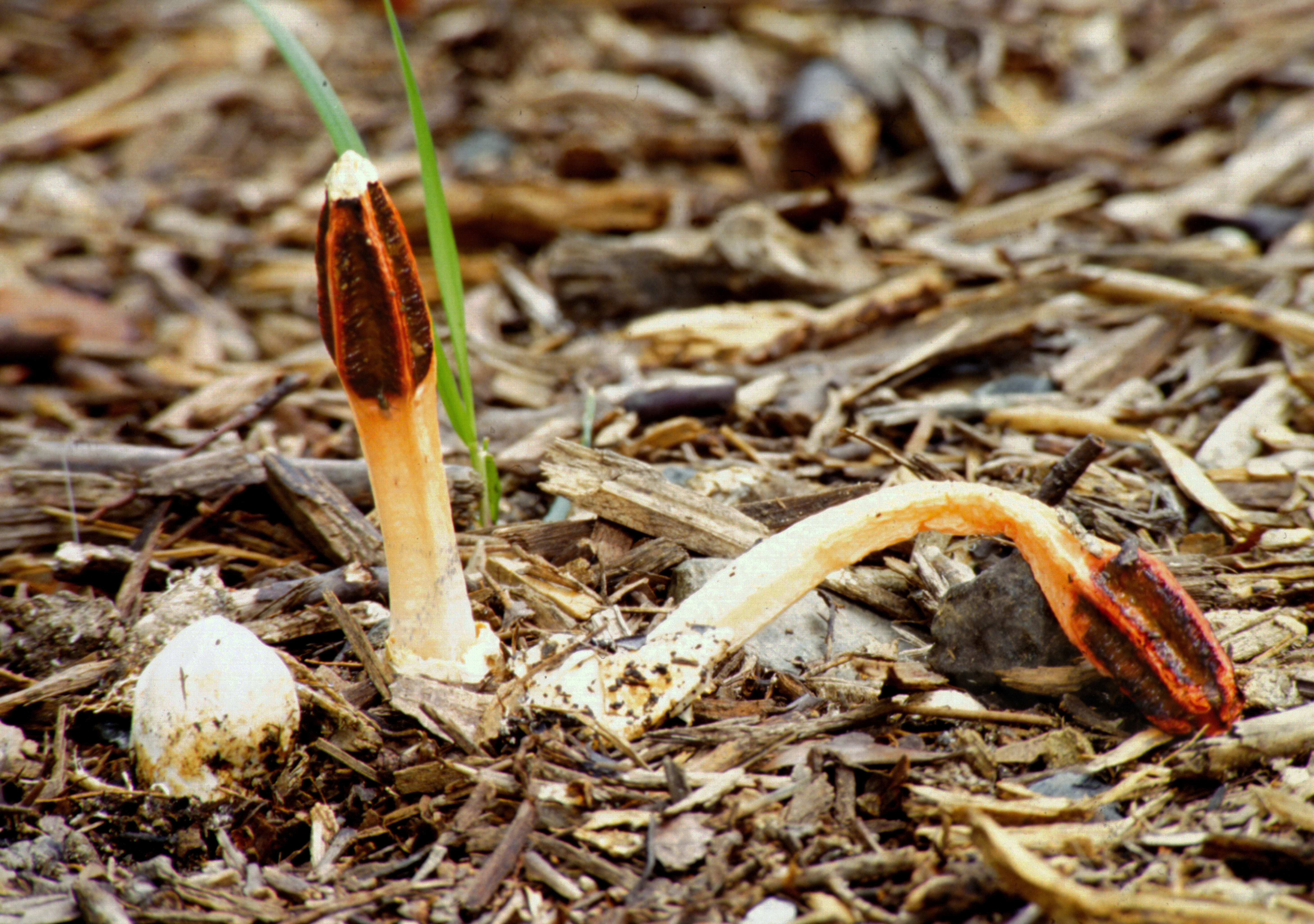 Les trois stades, d'abord dans un œuf, adulte érigé, âgé flétrit souvent avant ouverture des pinces